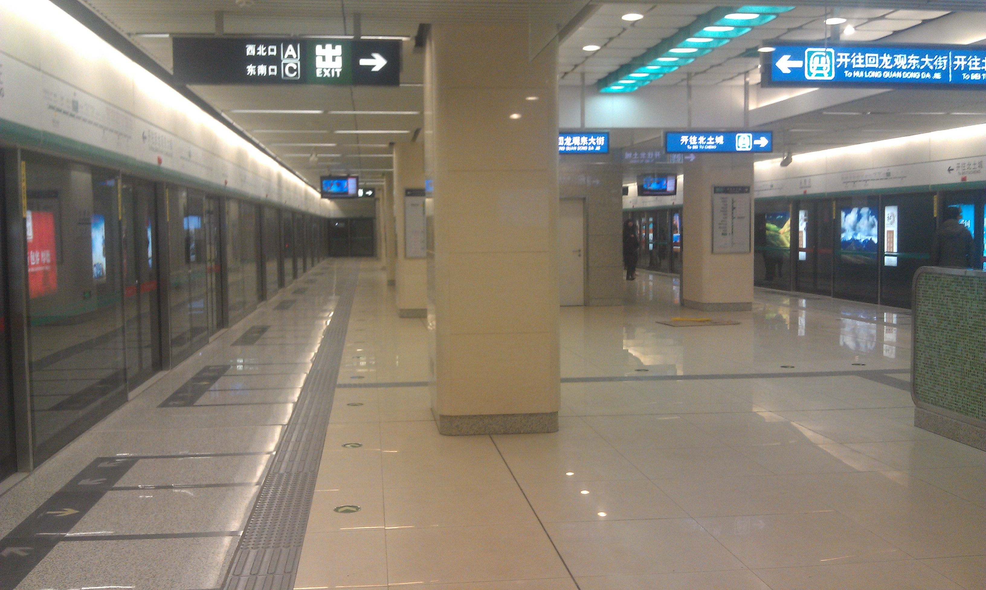 北京地铁永泰庄站站台